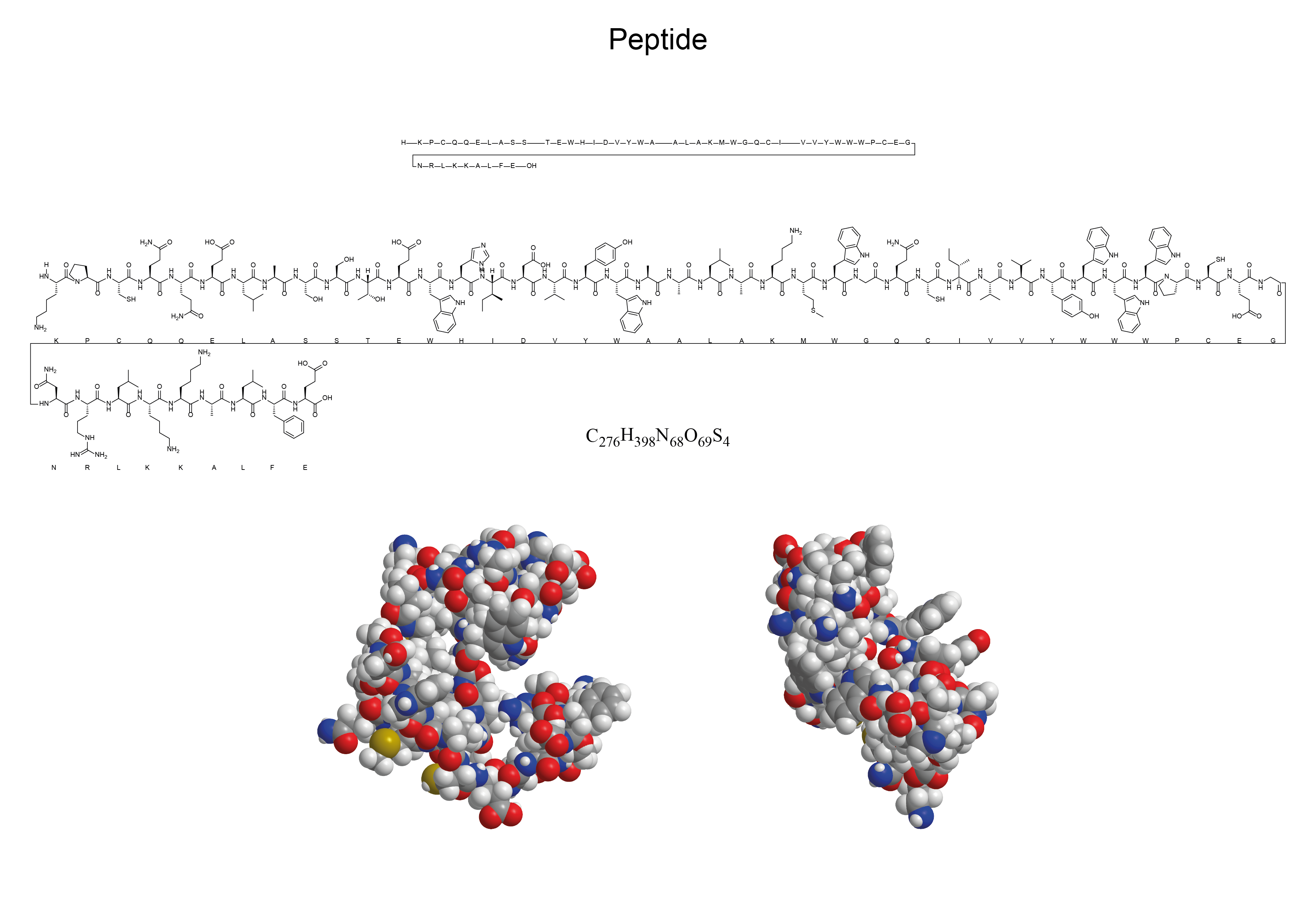 Différentes visualisation d'un peptide.